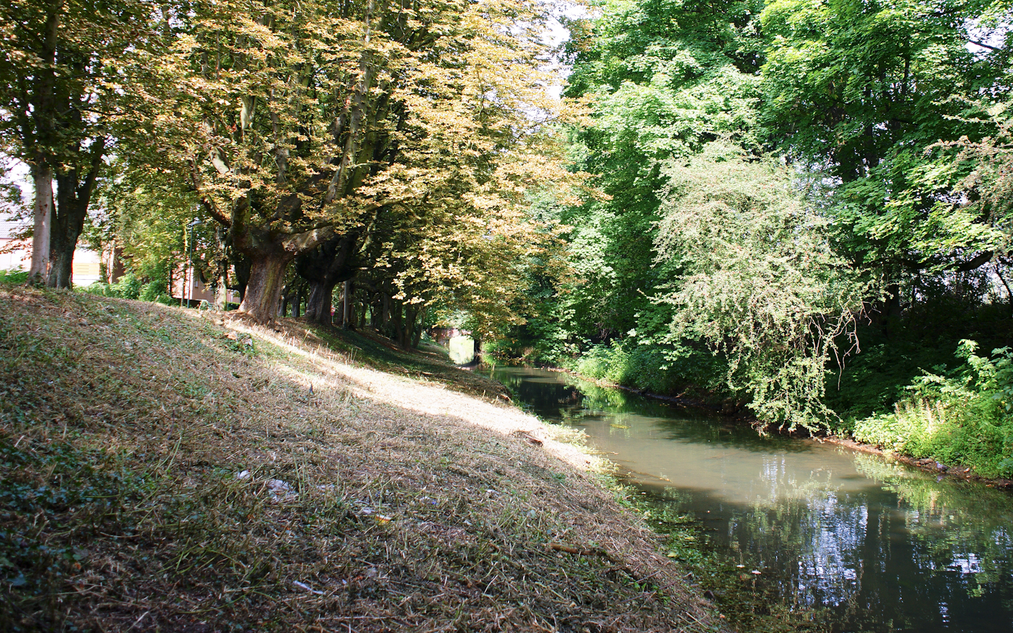 Nordkanal durch den Stadtwald Neuss